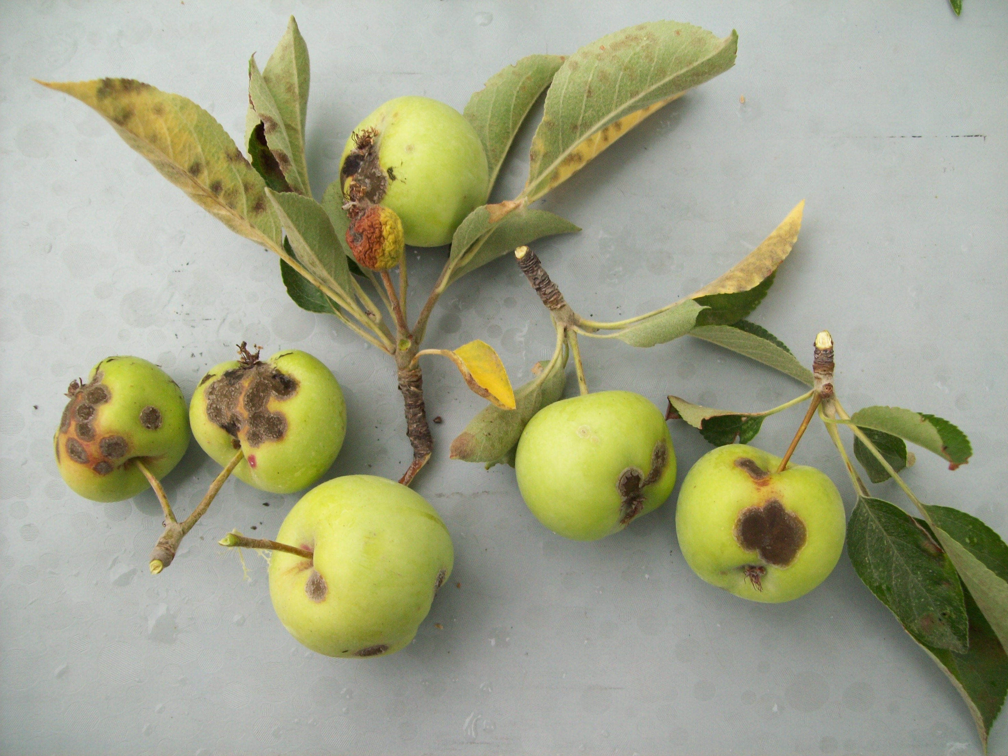 Парша яблони. Болезнь яблони. Уродливые завязи яблони пораженной паршой.